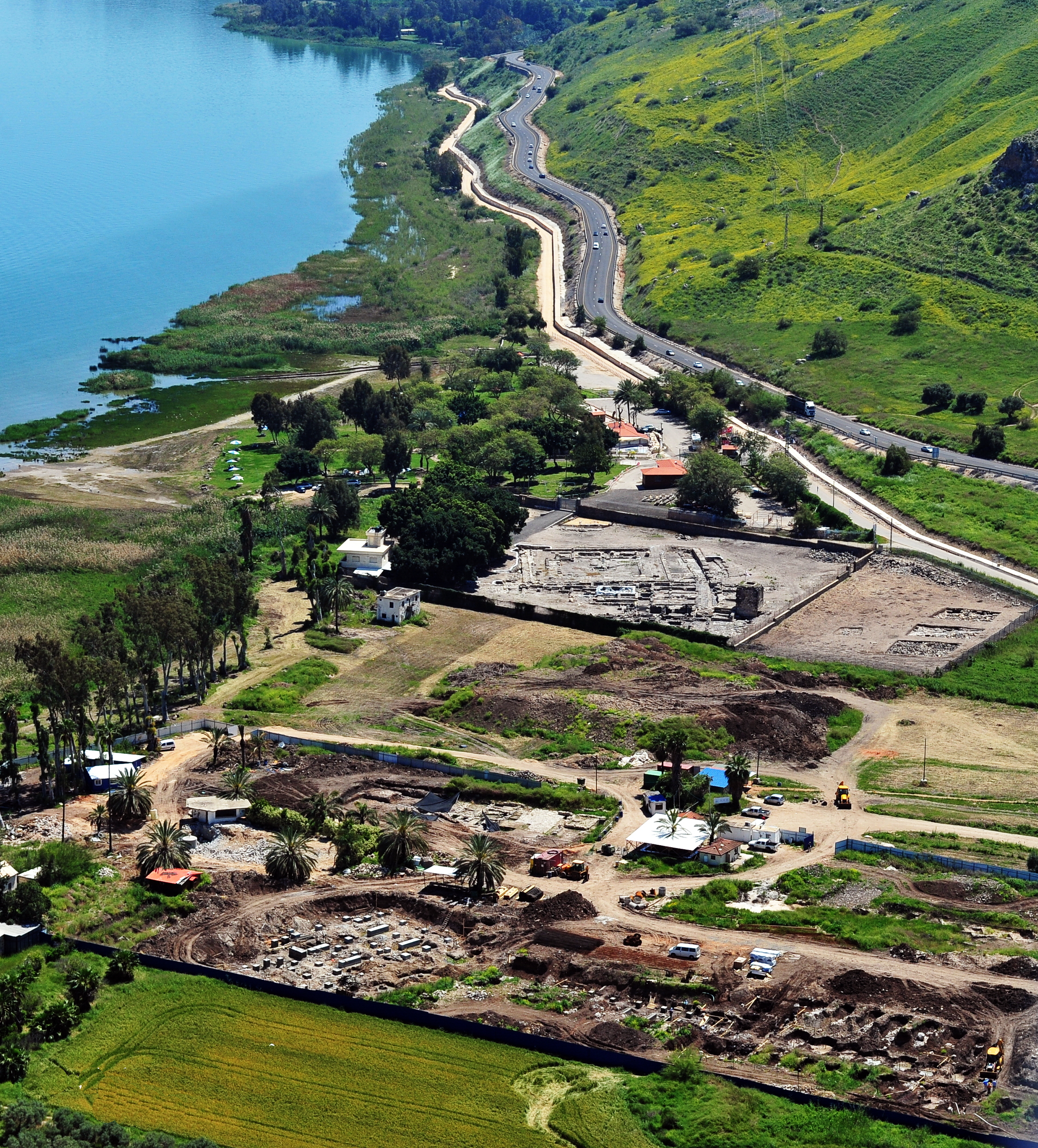 עיר קדומה בגליל, ששכנה לחוף הכנרת, בדרום בקעת גינוסר, סמוך ליישוב מגדל של היום המשמר את שמה. עד להקמת העיר טבריה בשנת 20 לספירה, הייתה מגדלא המרכז העירוני היחיד בחוף המערבי של הכנרת.